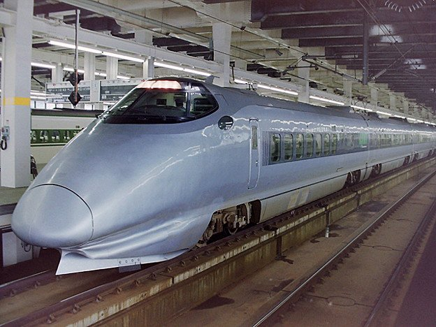 400系量産先行車S4編成。